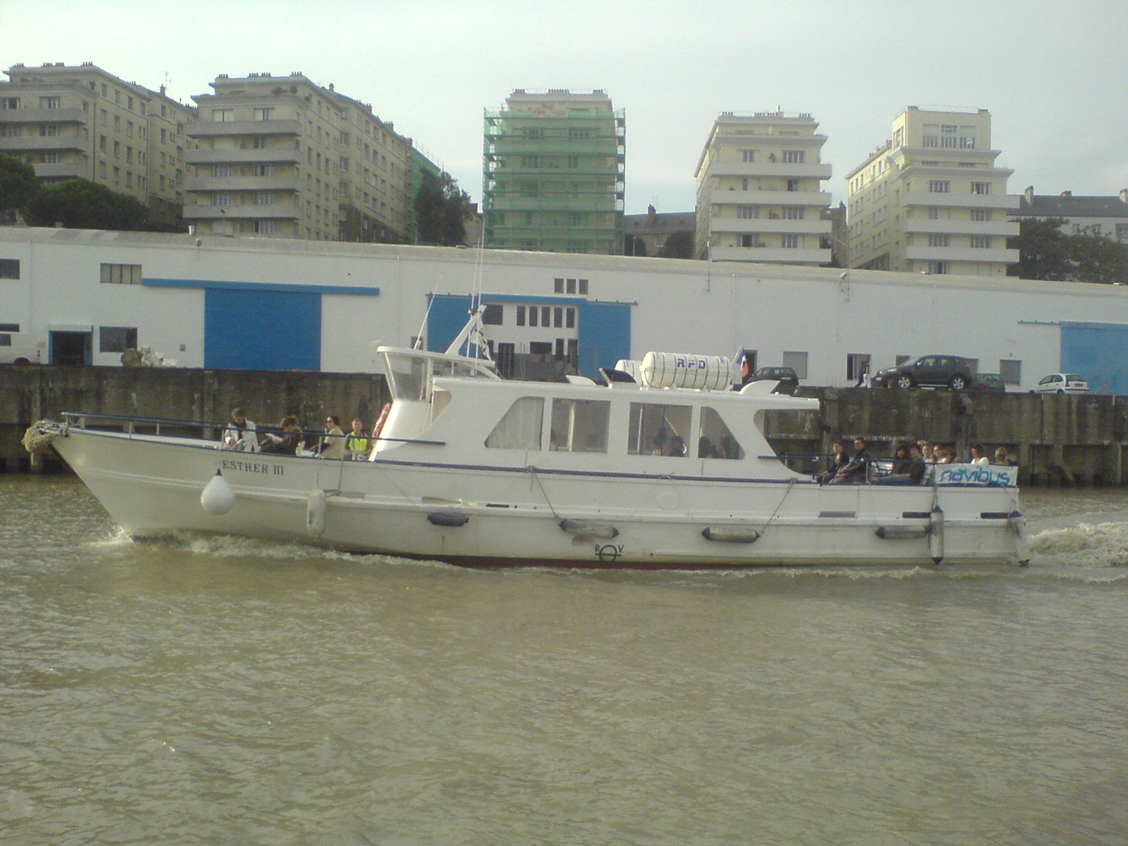 L' Esther 3, nouvelle recrue parmi les Navibus